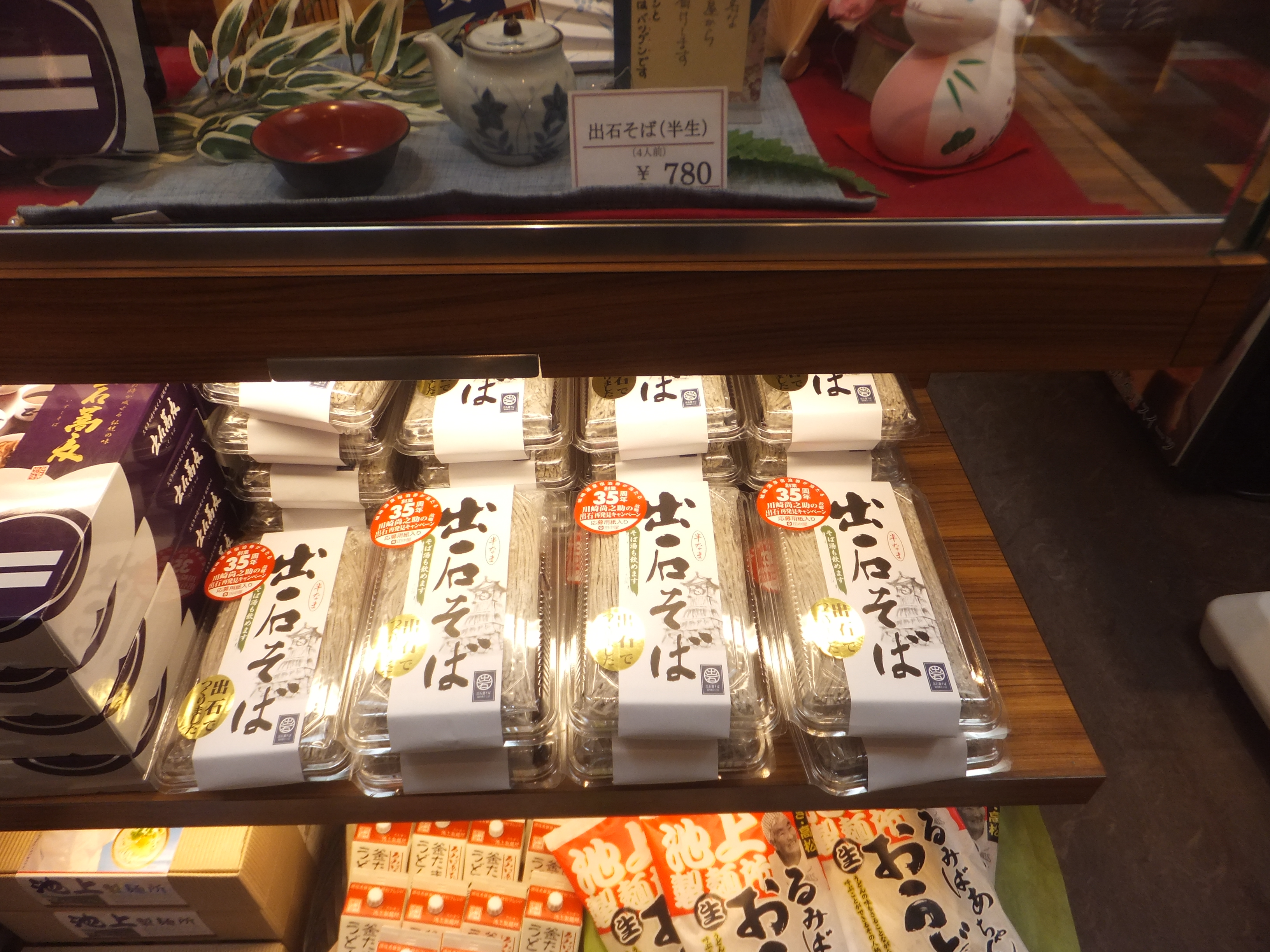 出石蕎麦